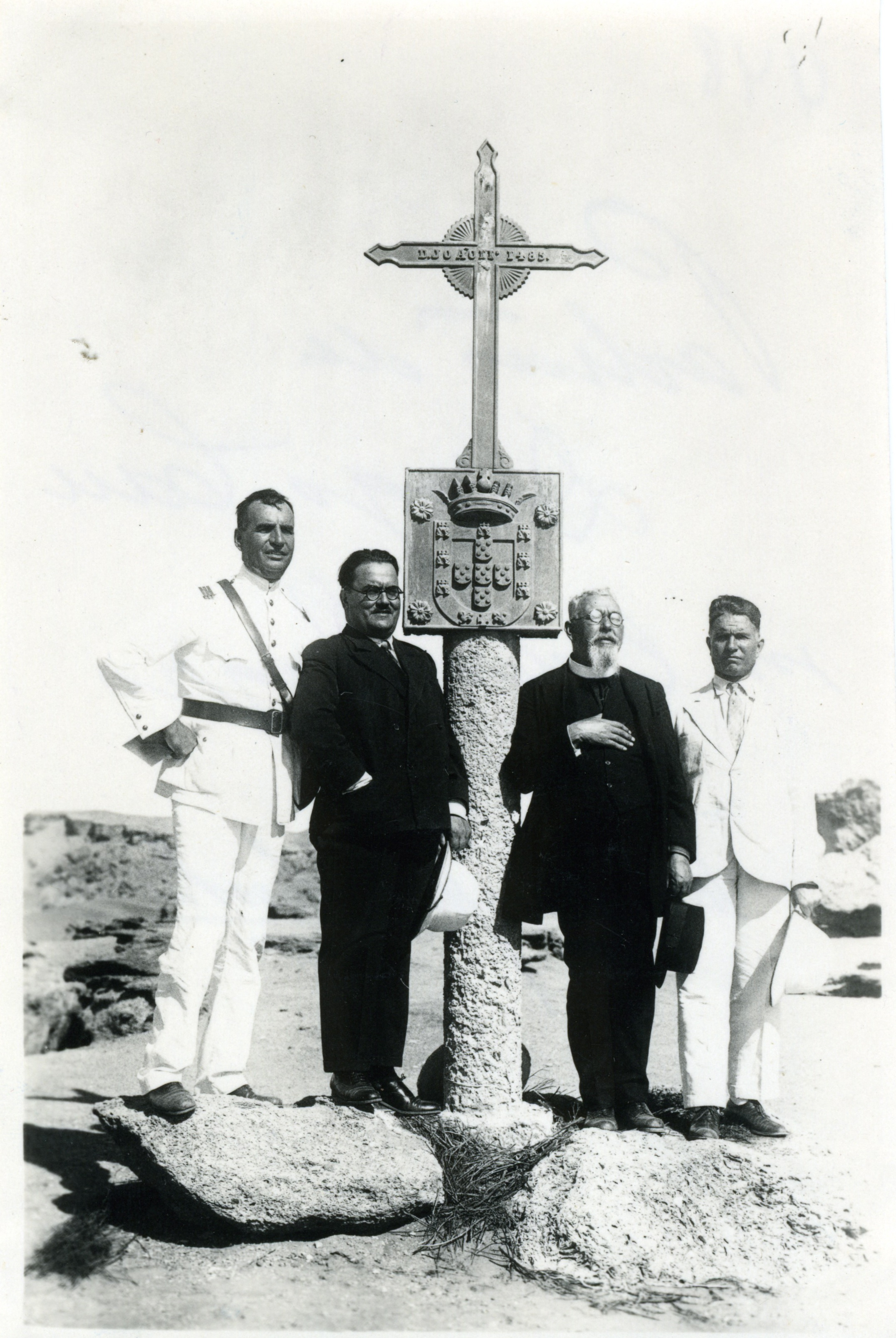 Phtos pour l'"exposição_colonial_portuguesa (1934)